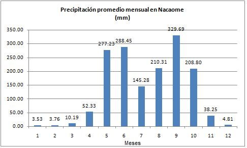 Gráfico de las precipitaciones promedio mensual en Nacaome, Valle, Honduras. Se basa en registros efectuados entre el 1951 y 1993, en el pluviómetro situado en NACAOME (LAT. N 13-31-32) (LNG. O 87-29-55 COTA 35 msnm)